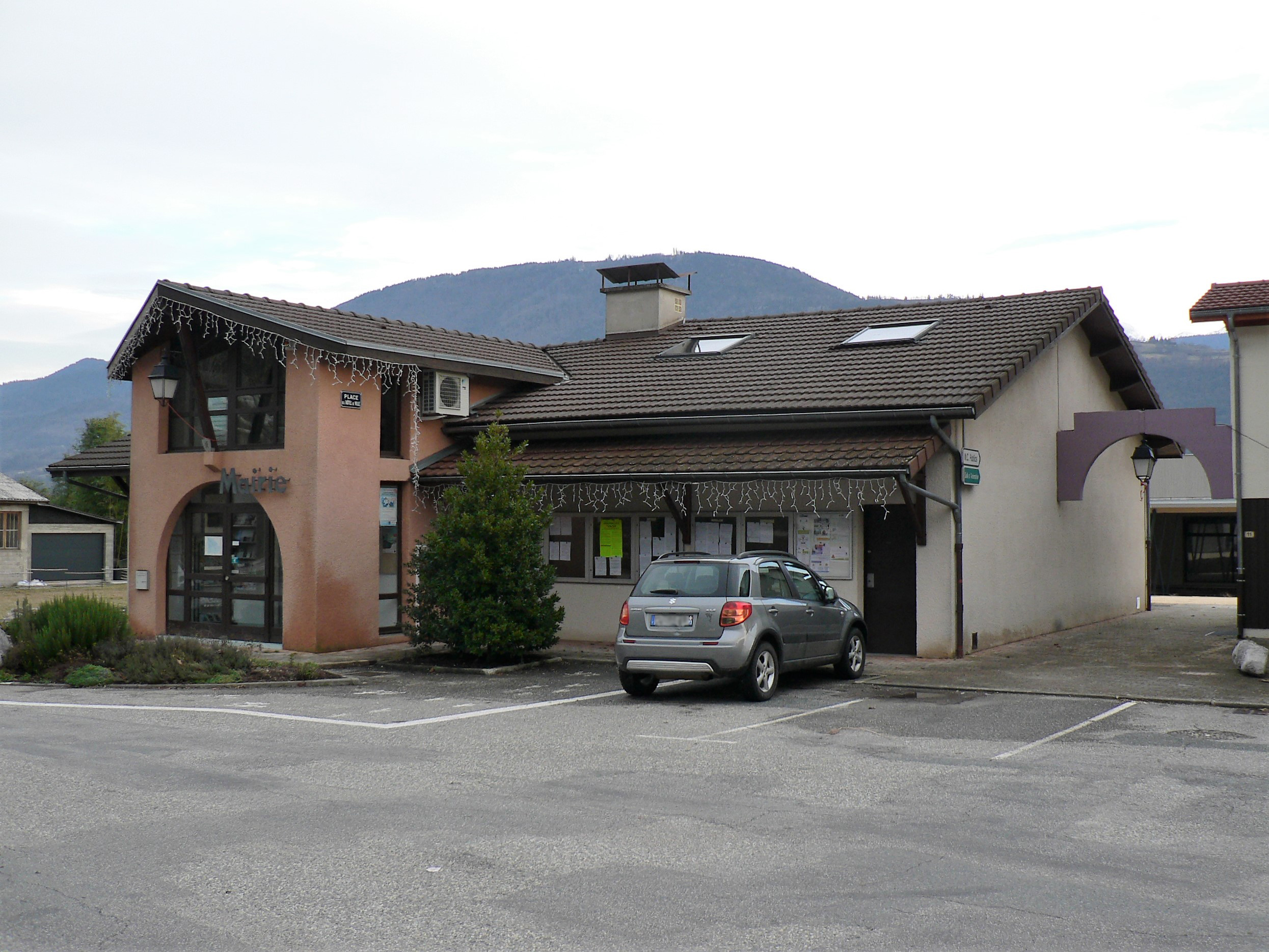 mairie de Sainte-Marie-d'Alloix, Isère, France.